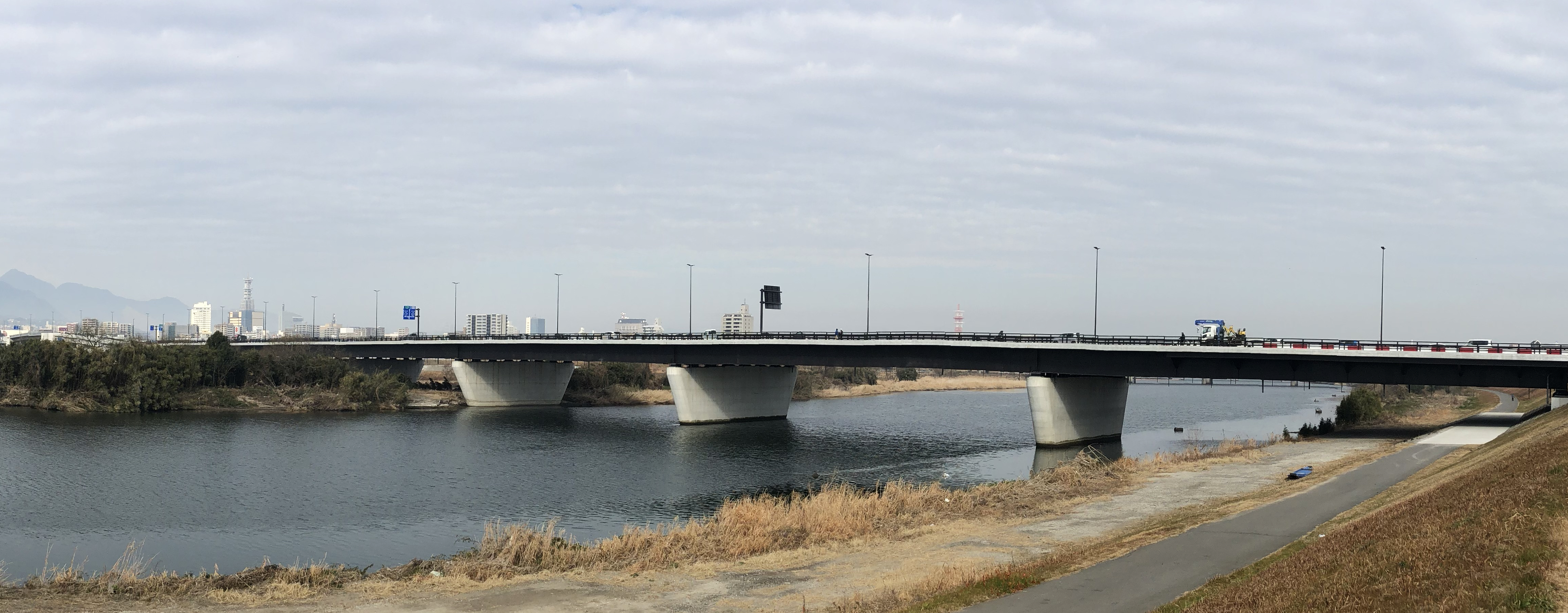 大分川にかかる宗麟大橋